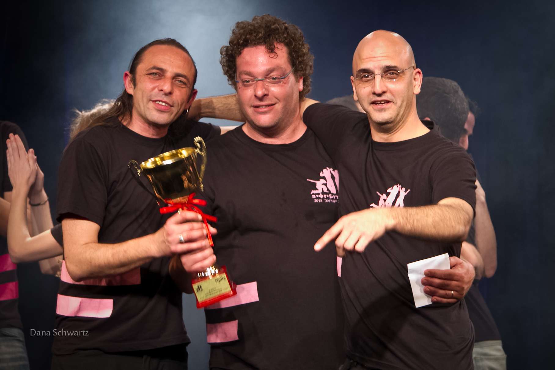 קבוצת האימפרוביזציה "למה אלפקה" בהופעה. מימין: אמיתי מלוא, אילן פופקו, יהב גל, יובל כהן (כורע)